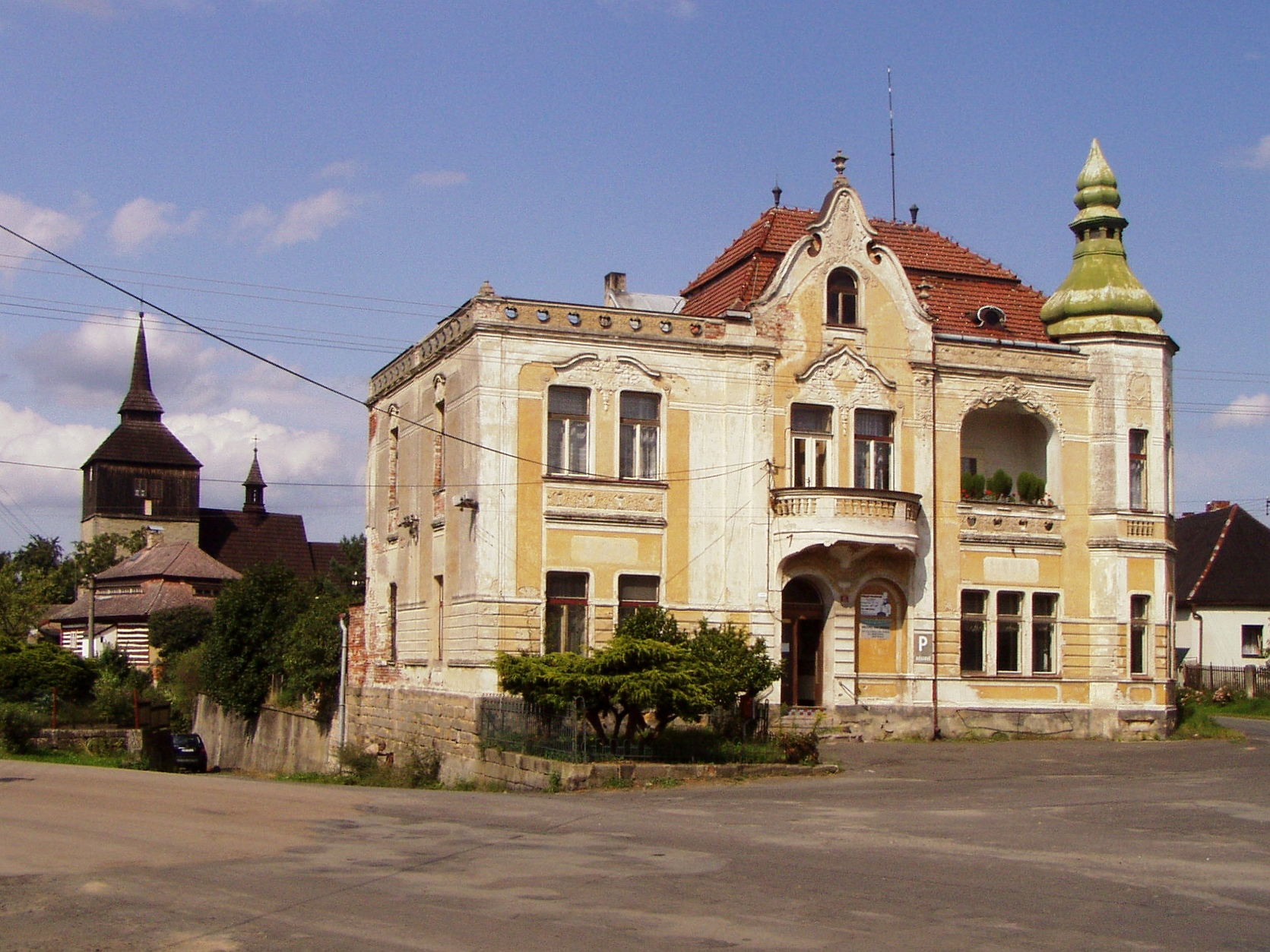 Náves obce Březina, kostel svatého Vavřince